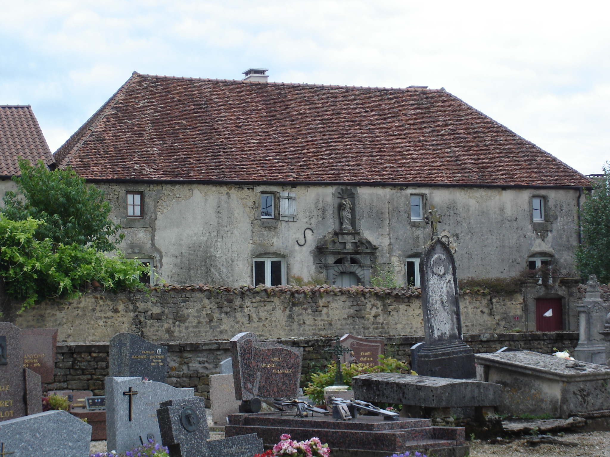 Le presbytère de Pouilly-en-Bassigny (commune de Le Châtelet-sur-Meuse, Haute-Marne) - classé MH